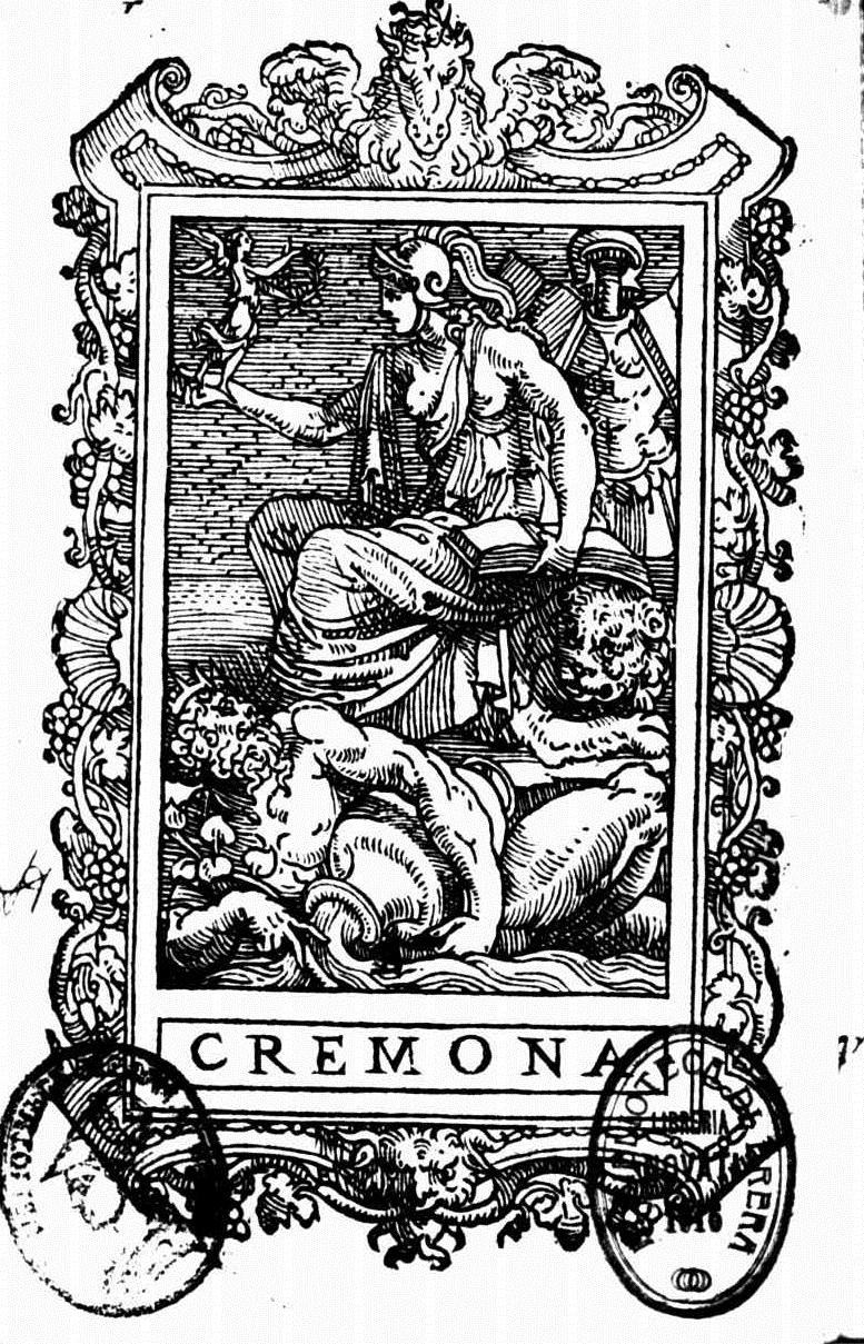 Frontespizio